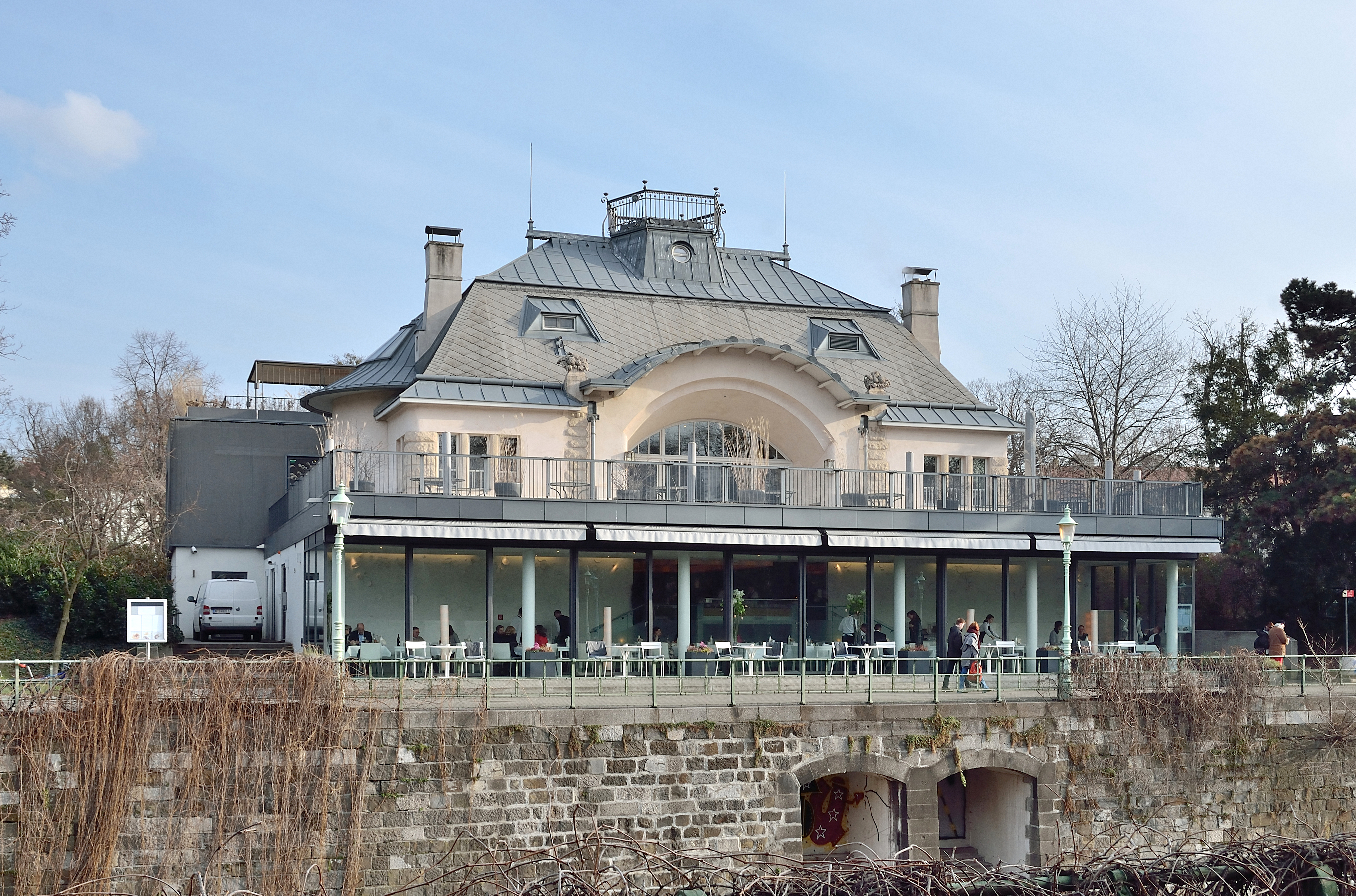 Die Meierei im Stadtpark von der anderen Seite des Wienflusses.